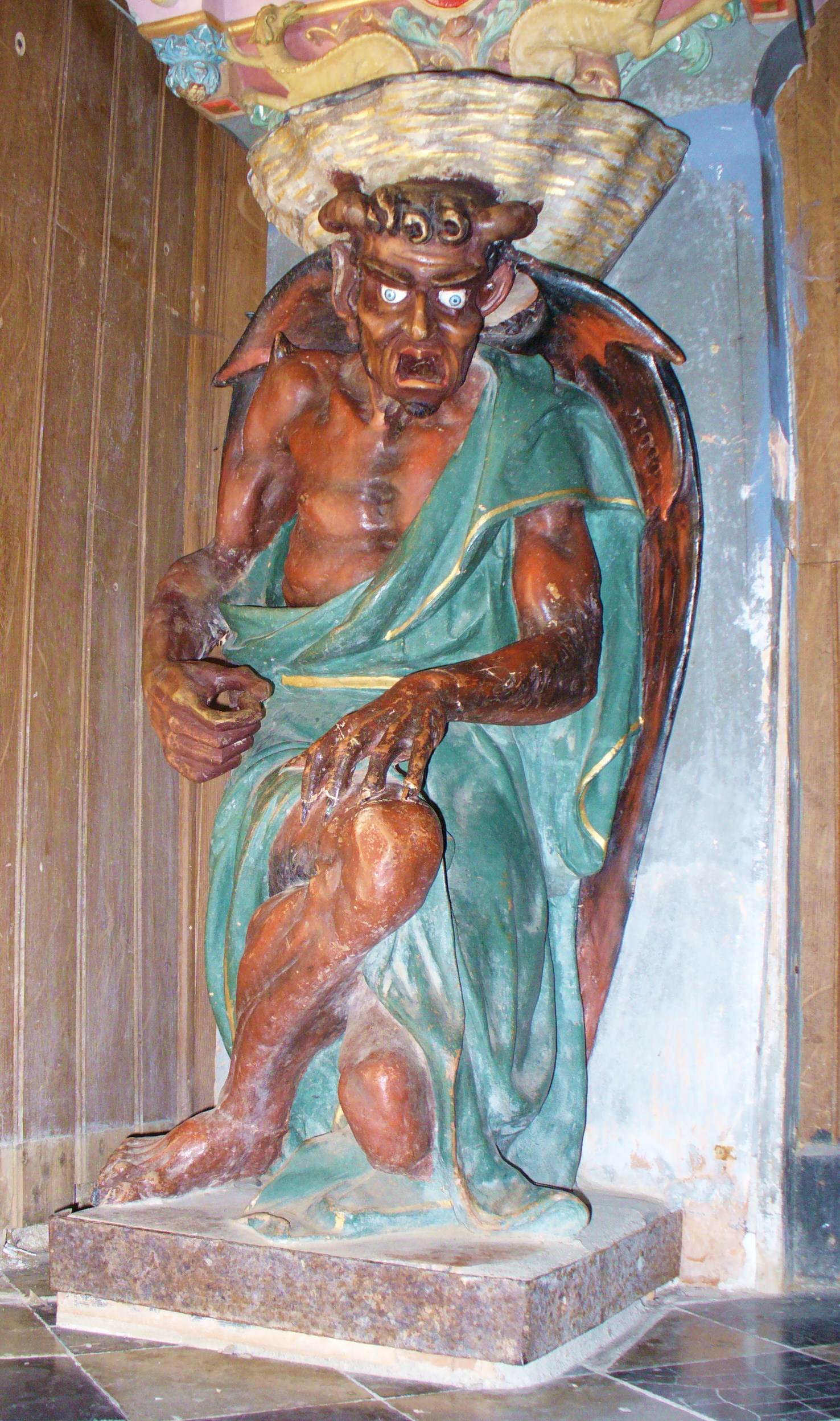 Der Teufel in der Kirche von Rennes-le-Château